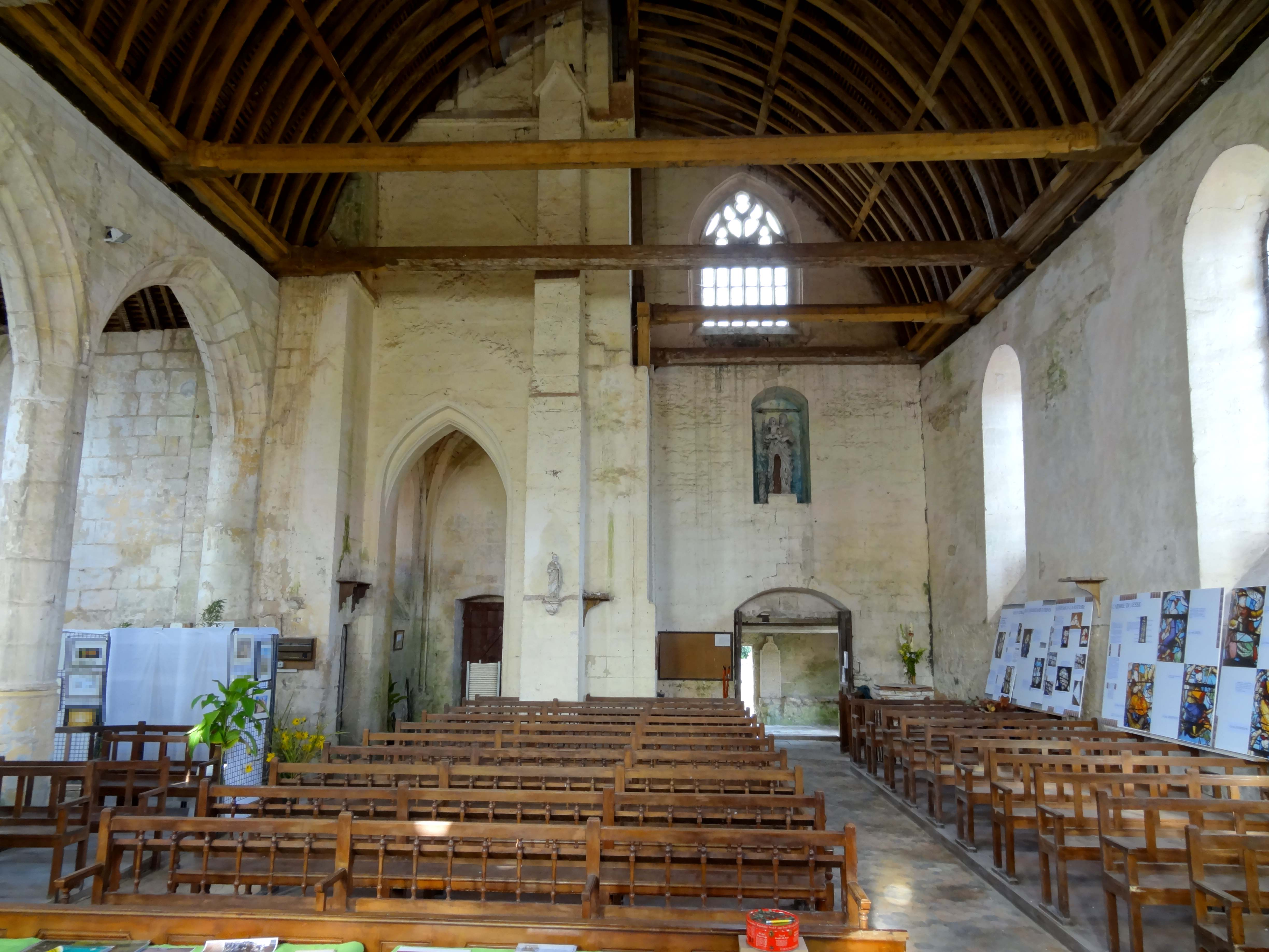 Intérieur de l'église - voir titre.